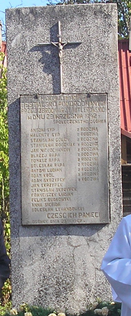 Pomnik pomordowanych przez niemieckich zbrodniarzy hitlerowskich w Osówku.